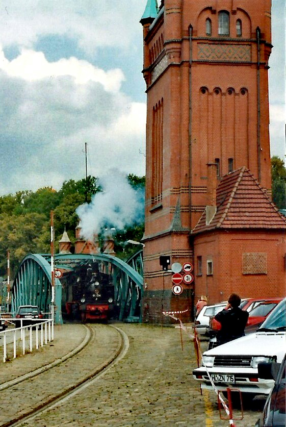 10. Lübecker Altstadtfest. Die Dampflok 91 134 (Preußische T 9.2) überfährt die Hubbrücke